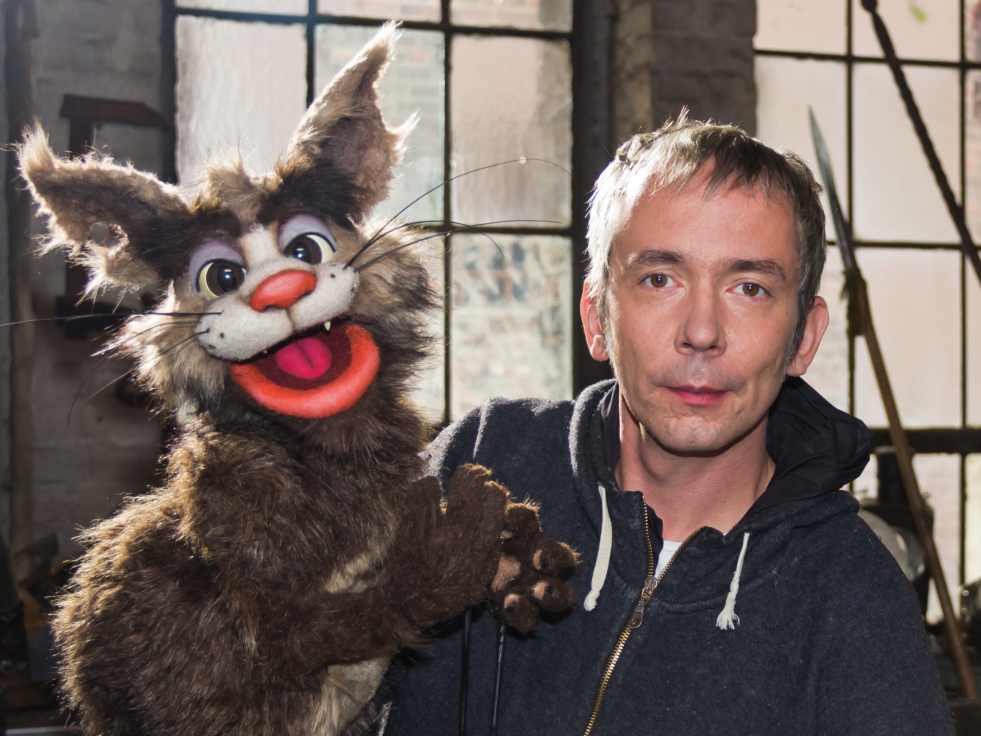 Dreharbeiten zur KiKA Geschichts-Comedy „Kaiser! König! Karl!“ im Rheinischen Industriebahnmuseum Köln Foto: Klappmaulpuppe Kater Karl, gespielt und gesprochen von René Marik